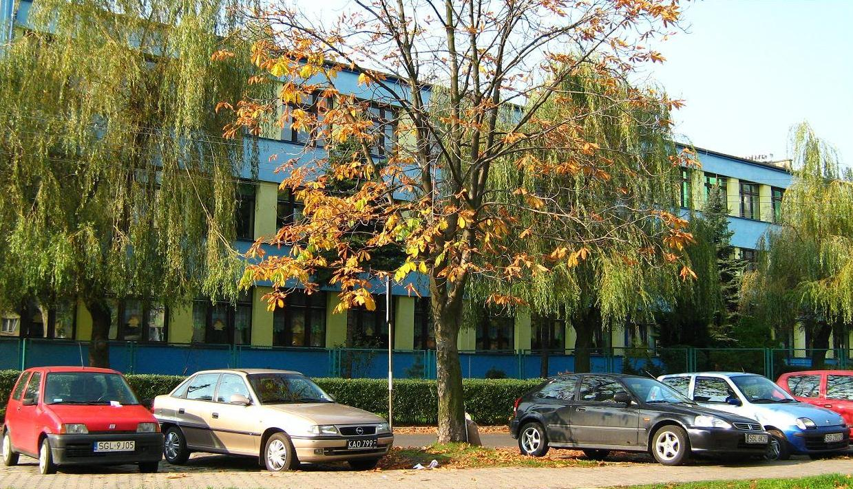 Miejska Szkoła Podstawowa nr 6 w Knurowie